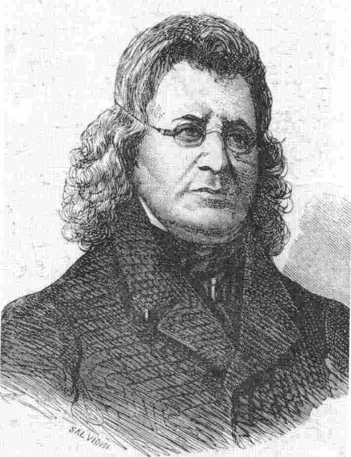 Ritratto di Jacopo Sanvitale (1785-1867), letterato e scienziato parmigiano.